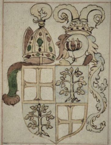 Bischofswappen Albert II. Krummendiek, aus der Rehbein-Chronik, Heft H, S. 54v (480)